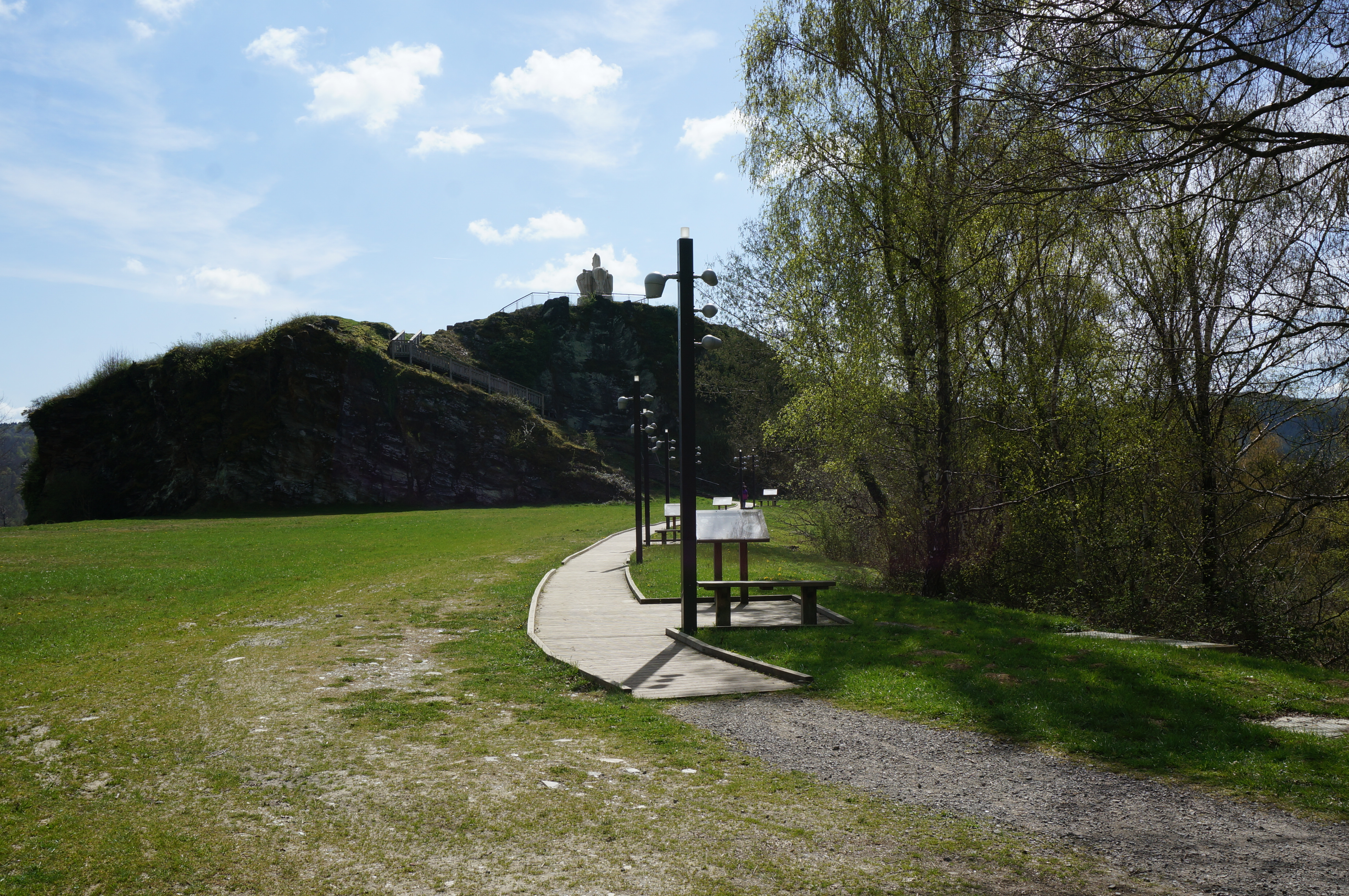 Vue de l'esplanade où était le château et du monment.